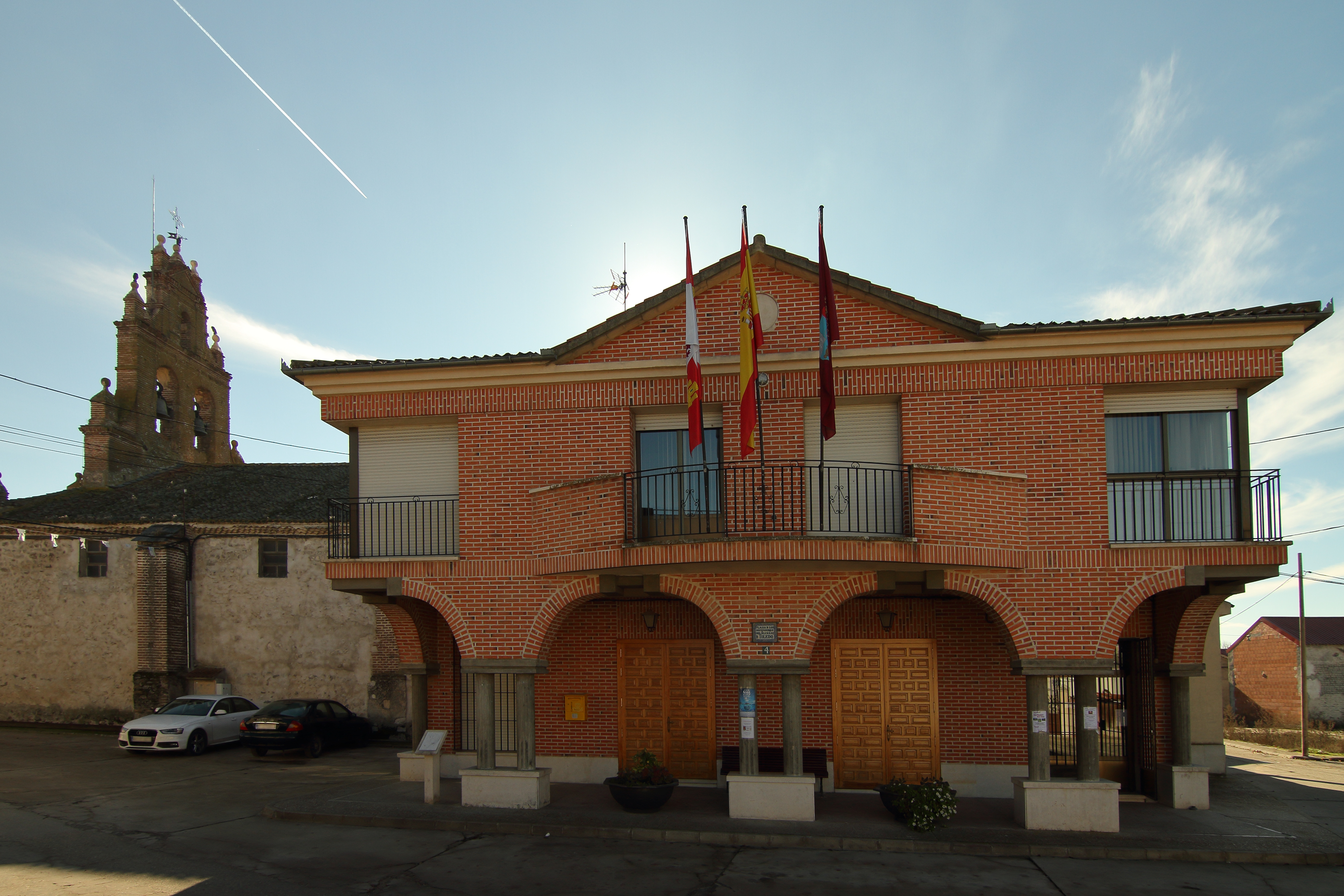 Gomezserracín, Ayuntamiento